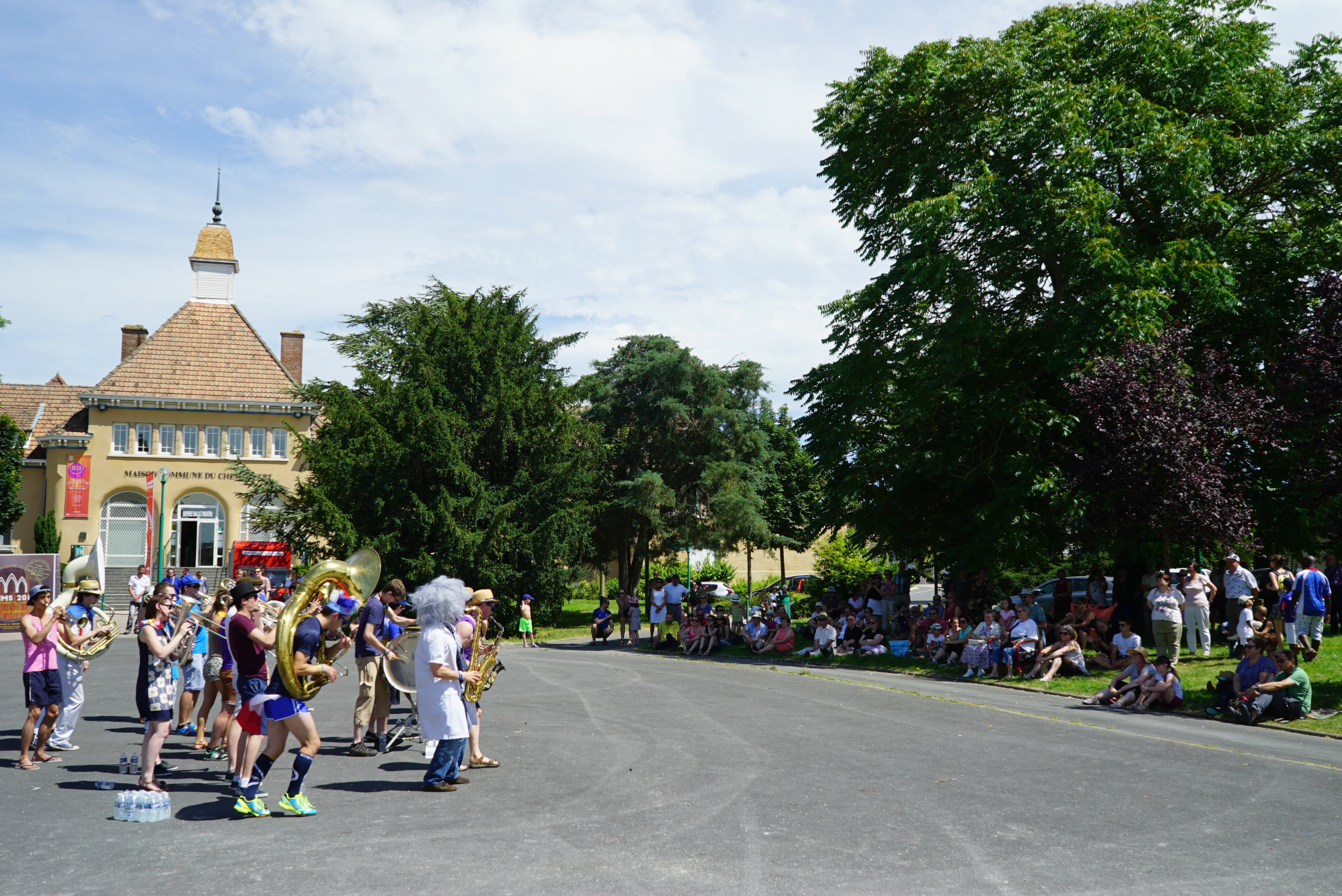 sur la Place du 11 novembre concert donné par les "Boules de feu".